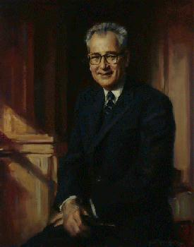 W. Willard Wirtz